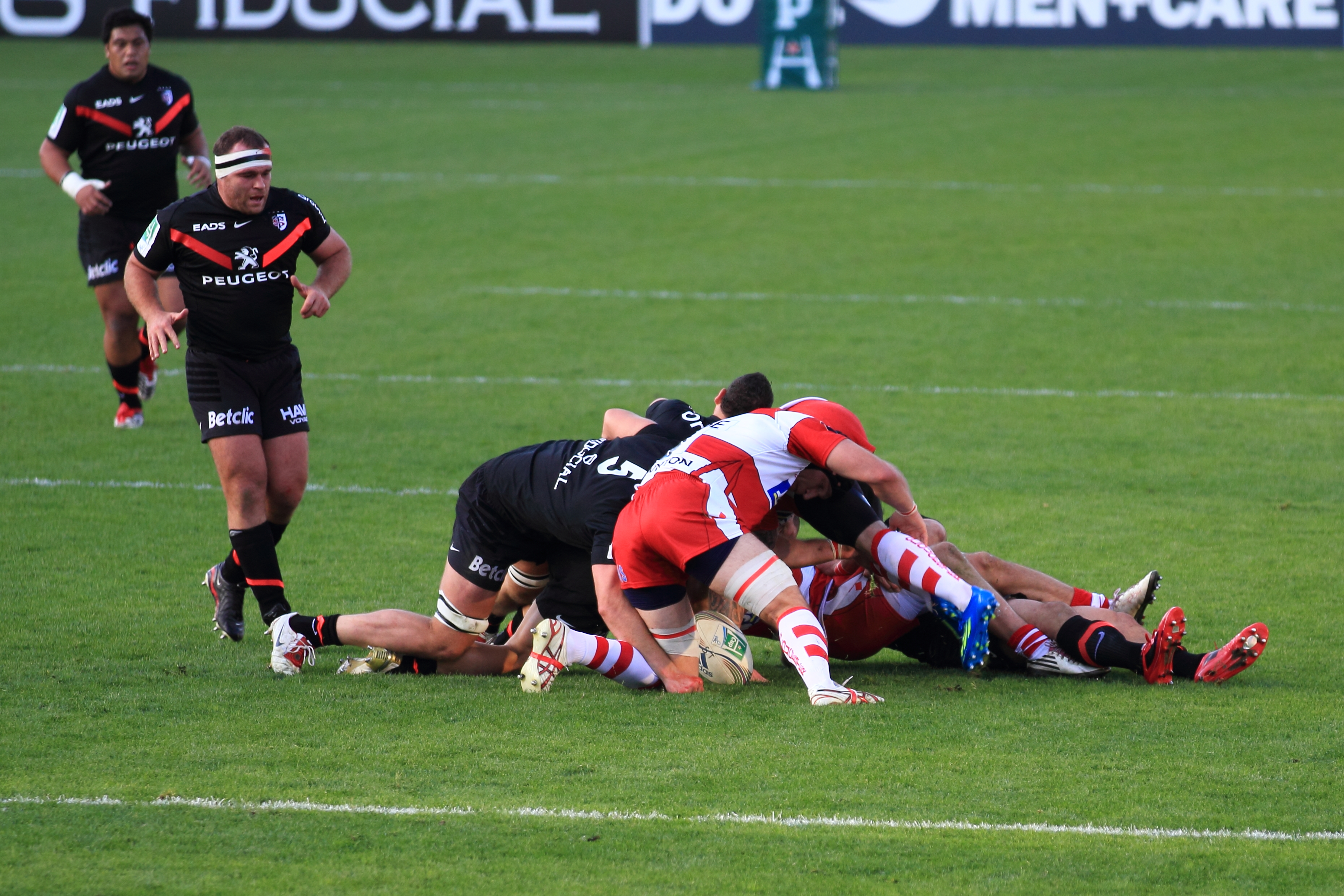 Heineken Cup — 13 November 2011, Stade Ernest Wallon. Match between: Stade toulousain — Gloucester Rugby